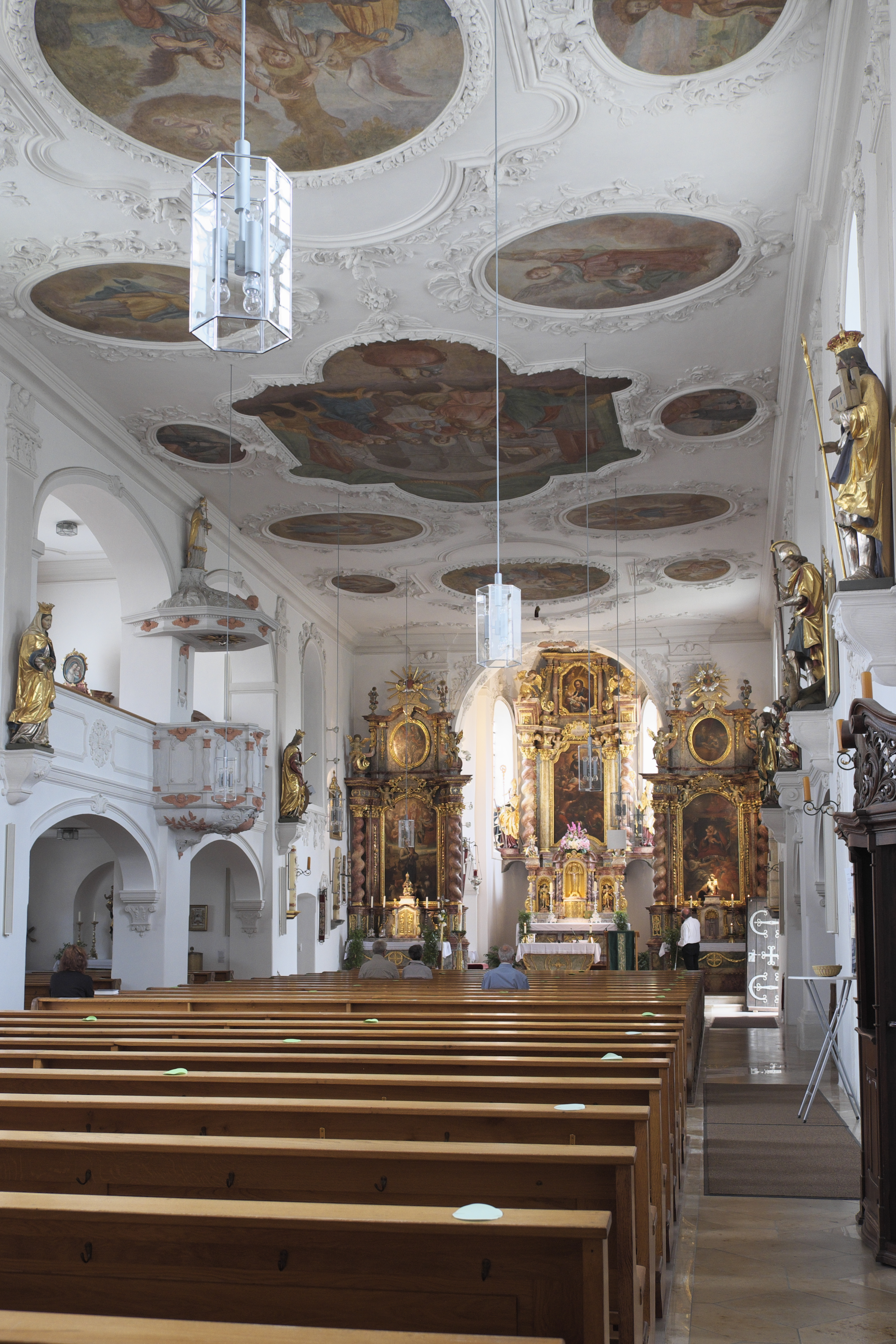 Katholische Pfarrkirche St. Leonhard in Pförring im oberbayerischen Landkreis Eichstätt (Bayern/Deutschland), Innenraum